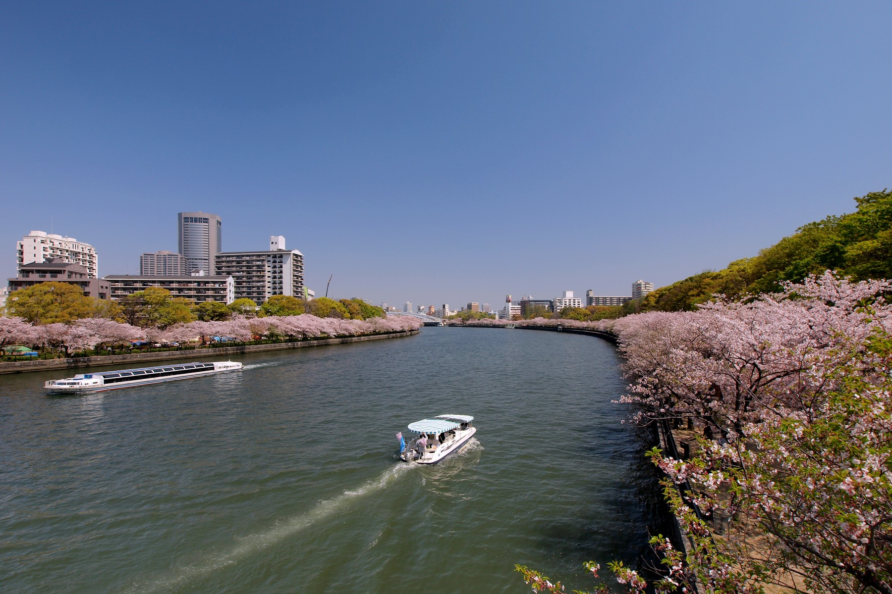 桜之宮公園（川崎橋より撮影） 所在地：大阪府大阪市北区・都島区